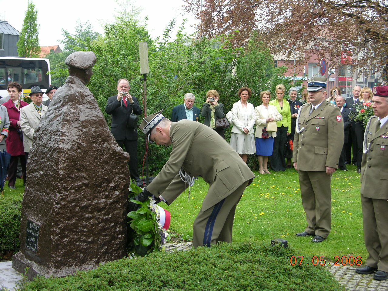 7.05.2006 rok. Beveren, Belgia, obchody rocznicy zakończenia II wojny światowej. Gen. bryg. Marek Ojrzanowski składa wieniec pod pomnikiem gen. Maczka.